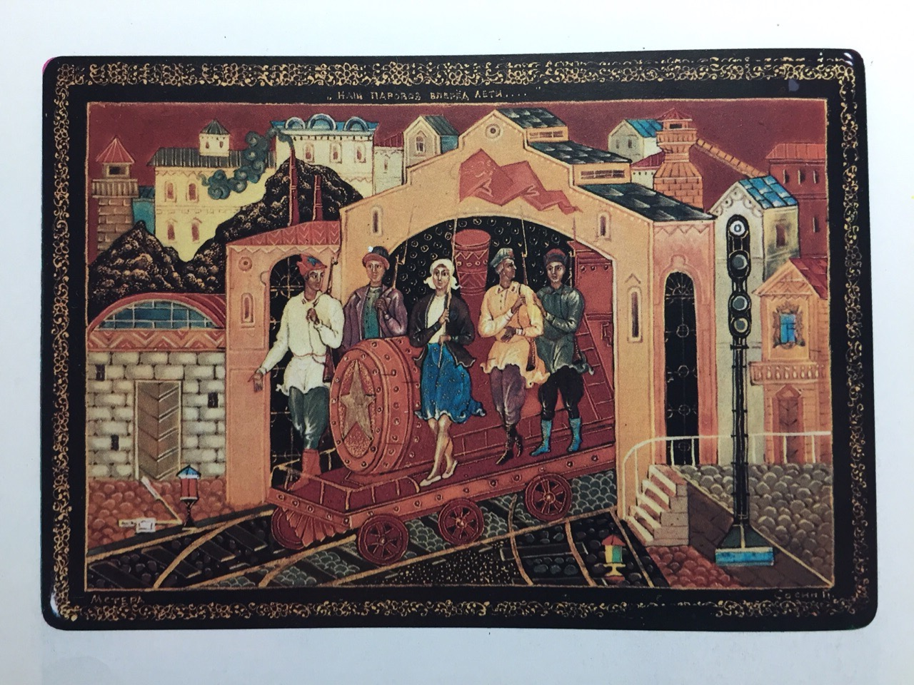 Миниатюра